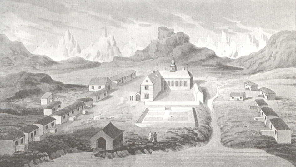 Neu-Herrnhut/Noorliit/Greenland